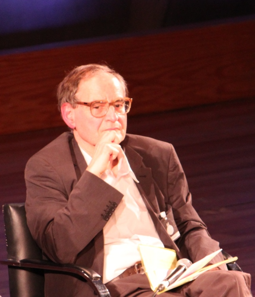 Arnaud de Saint Simon et Michel Lacroix à l'Université de la Terre, Paris, 2 avril 2011.